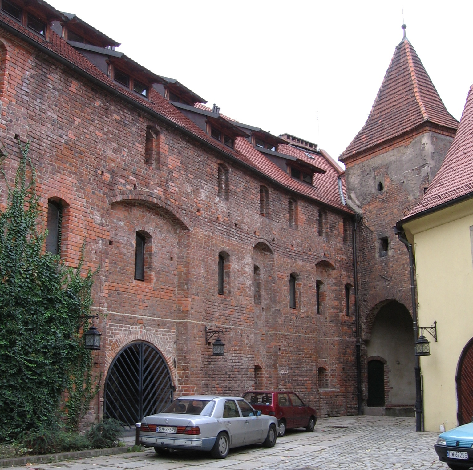 Wroclaw, Poland - the Arsenal (Cieszyńskiego Street): internal yard Wrocław - Arsenał (ul. Cieszyńskiego): podwórko wewnętrzne